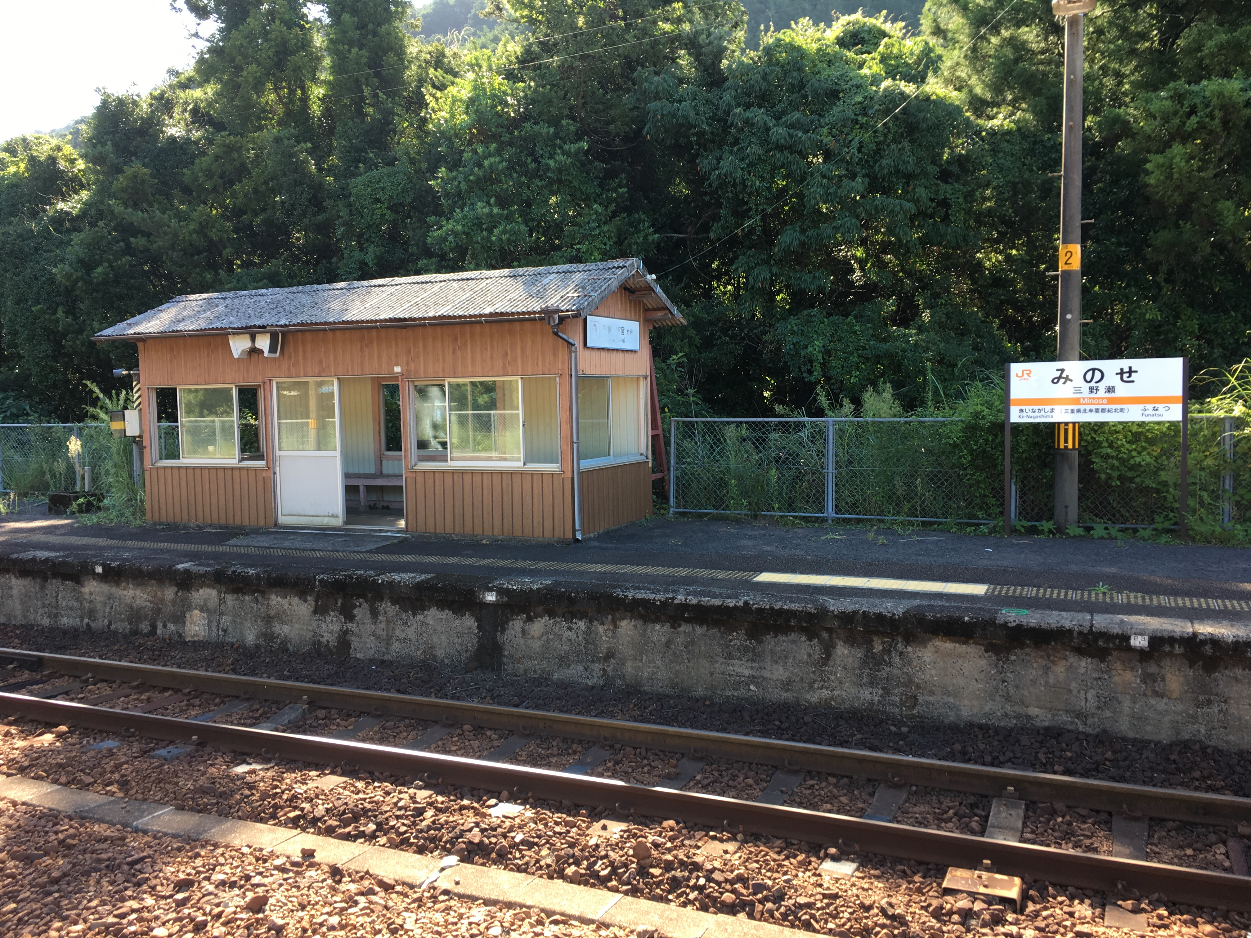 2017年9月